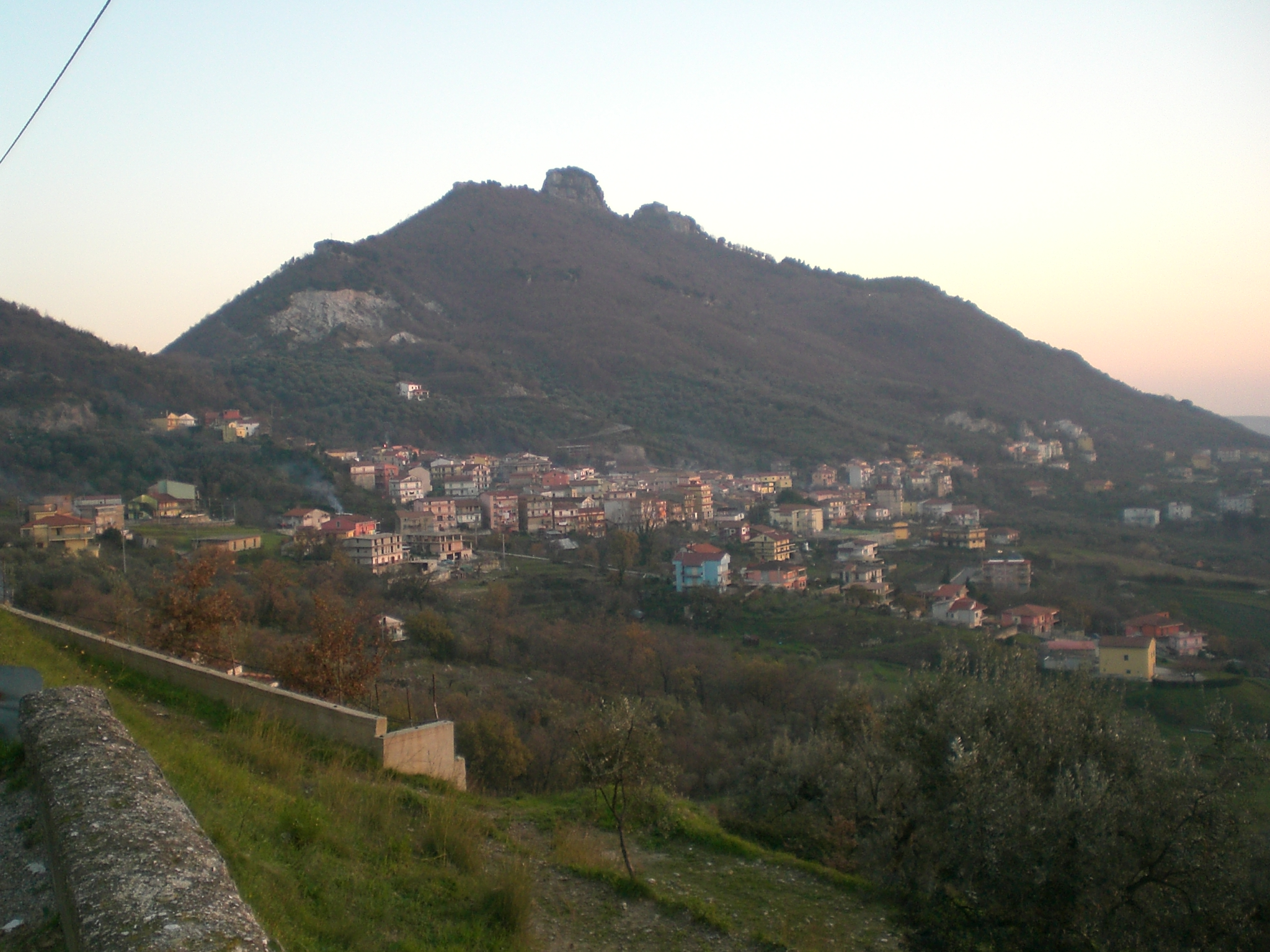 Panorama di Salitto, frazione di Olevano sul Tusciano.